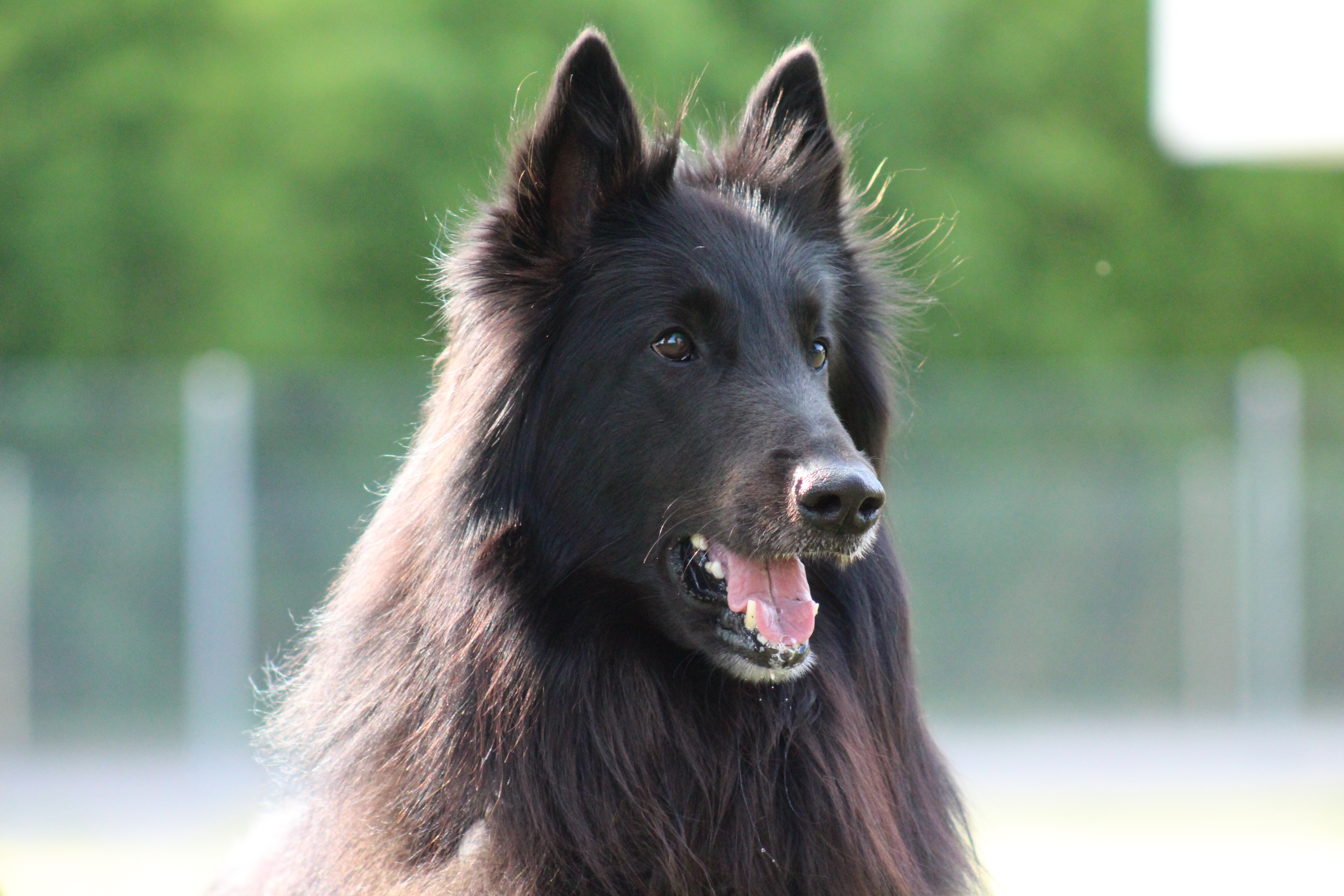 Berger Belge Groenendael Type Beauté l’un des deux types présent dans le berger belge ( beauté/travail)